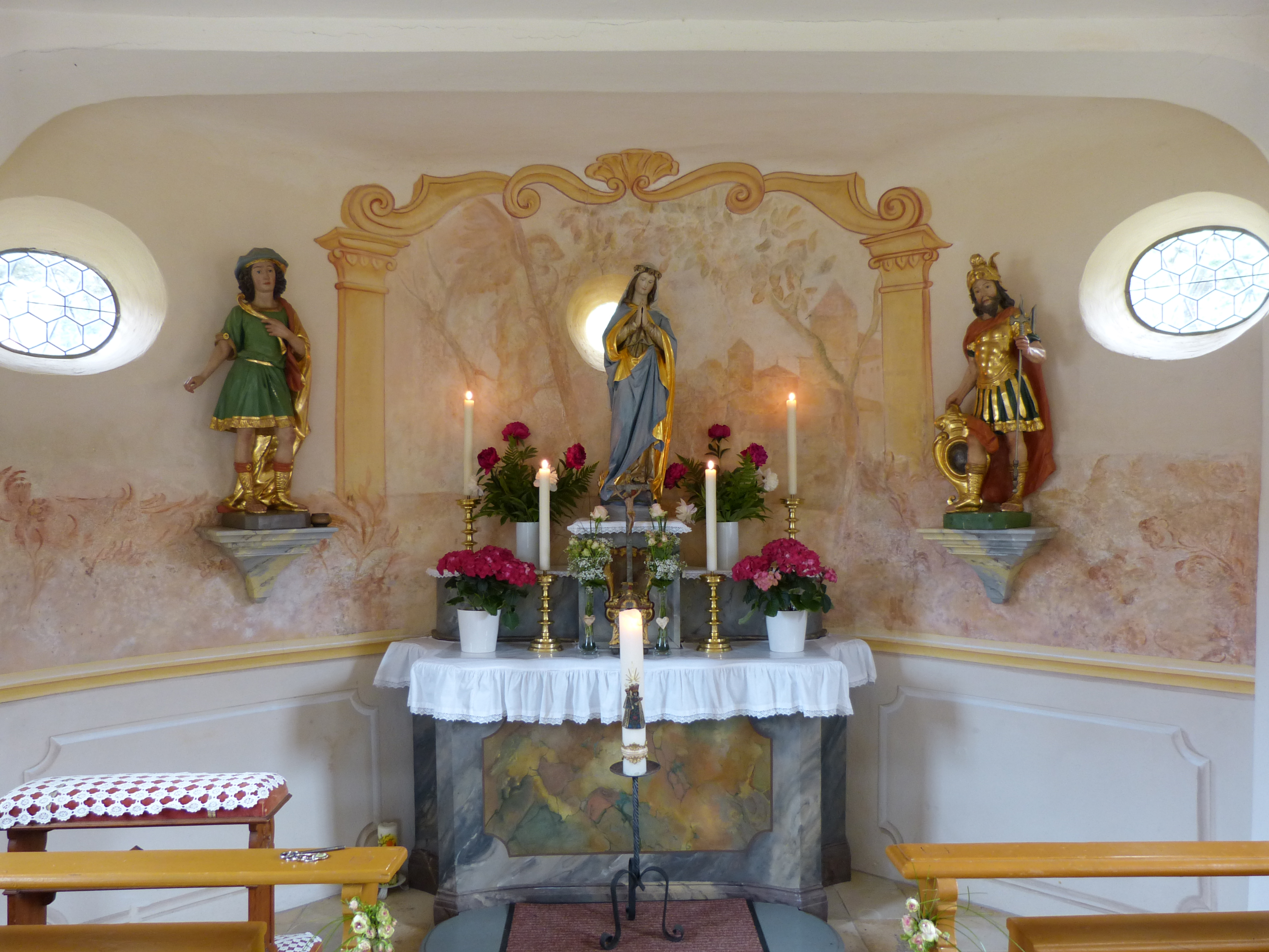 St. Maria im Weiler Bossarts, 18. Jahrhundert, Gemeinde Wolfertschwenden, Landkreis Unterallgäu, Bayern